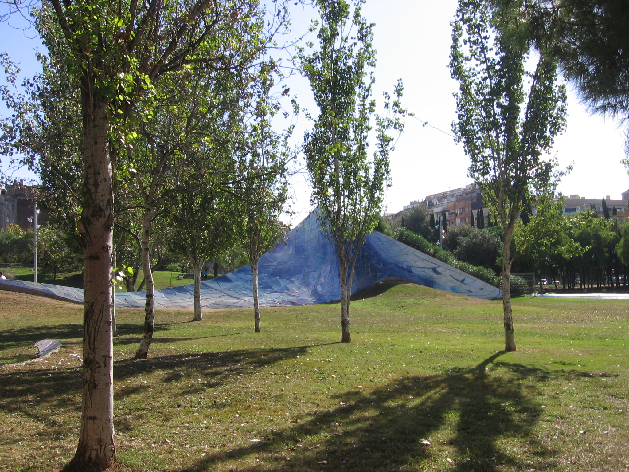 Parque de la Estación del Norte (Barcelona).